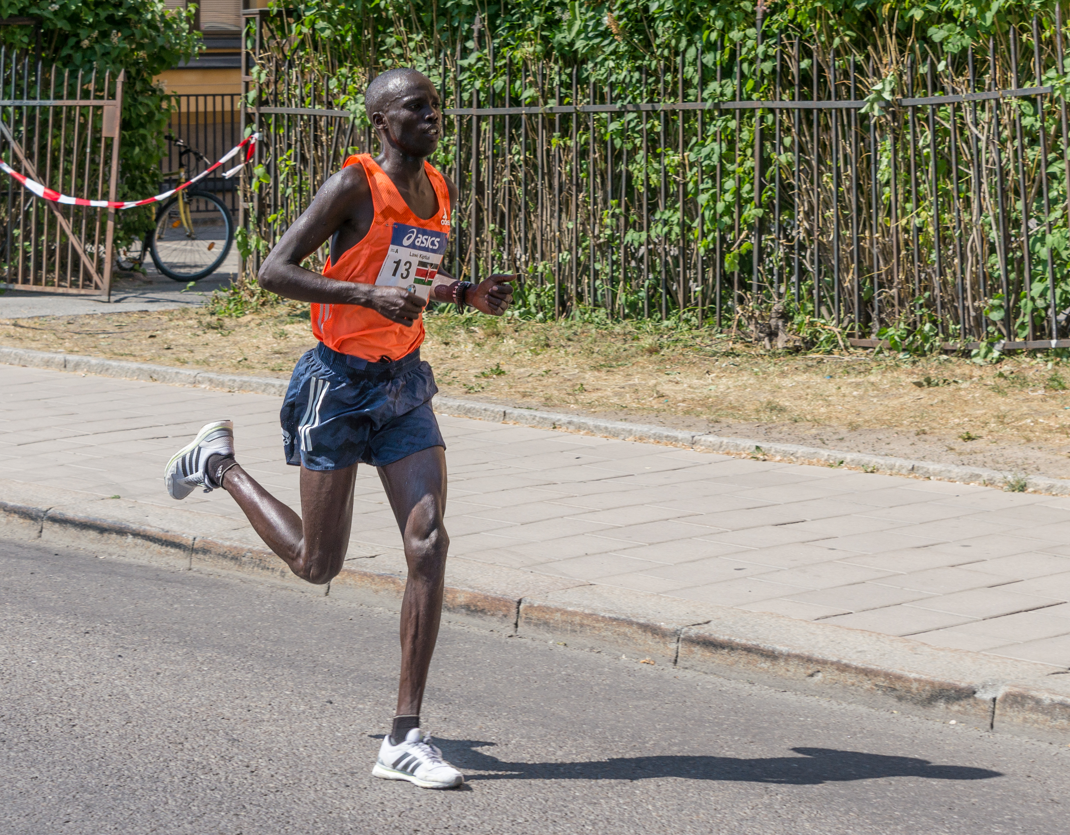 Stockholm Marathon 2018.